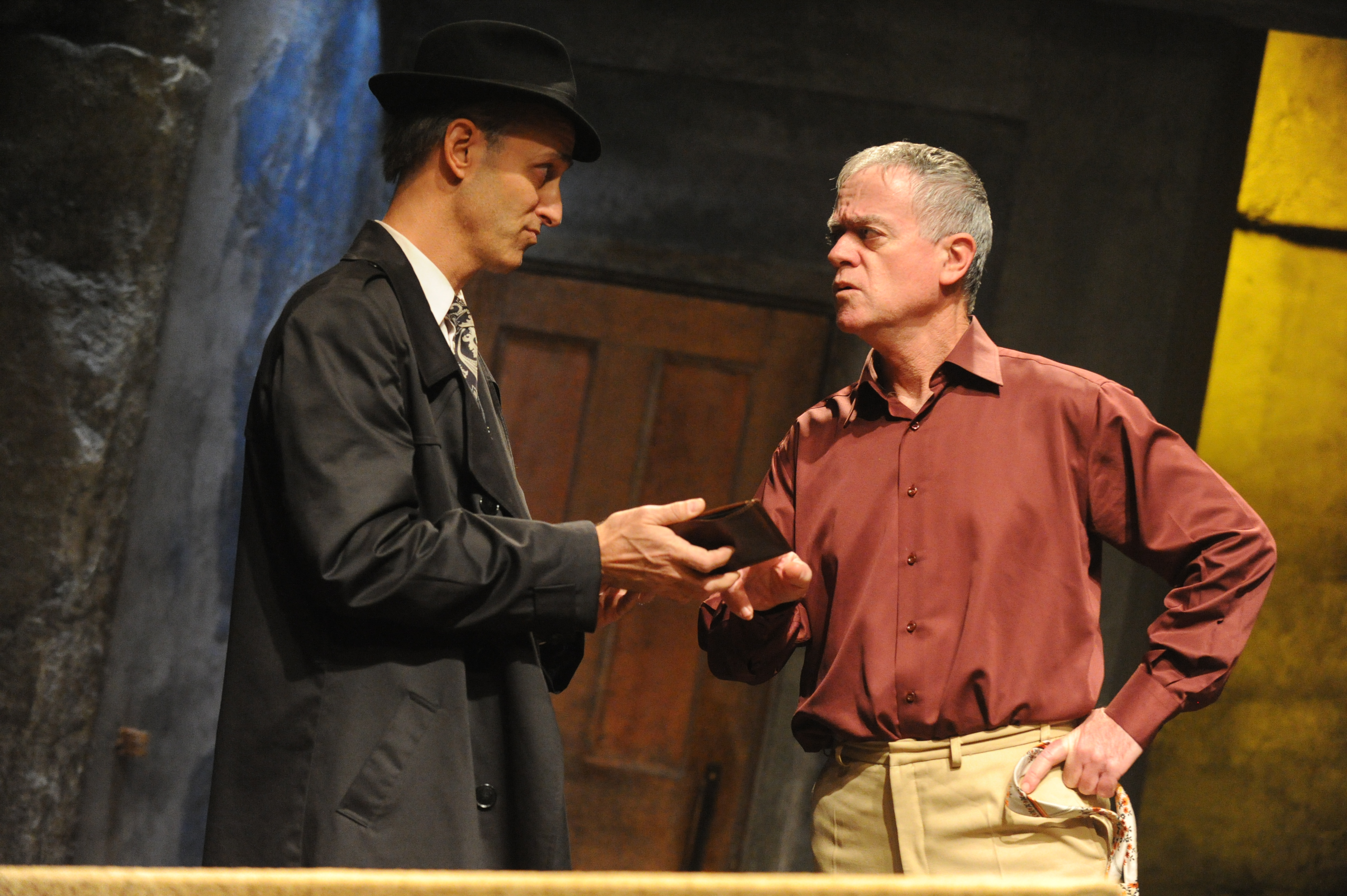 יהויכין פרידלנדר וניר רון בהצגה "חוקר פרטי", מאת ובבימויו של מיקי גורביץ', תיאטרון החאן, 2011